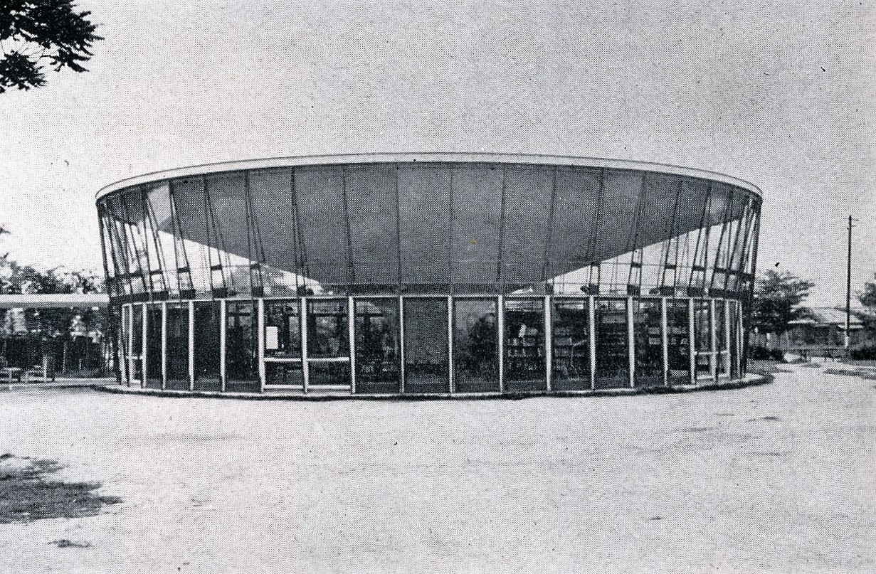 1955年の広島児童図書館。